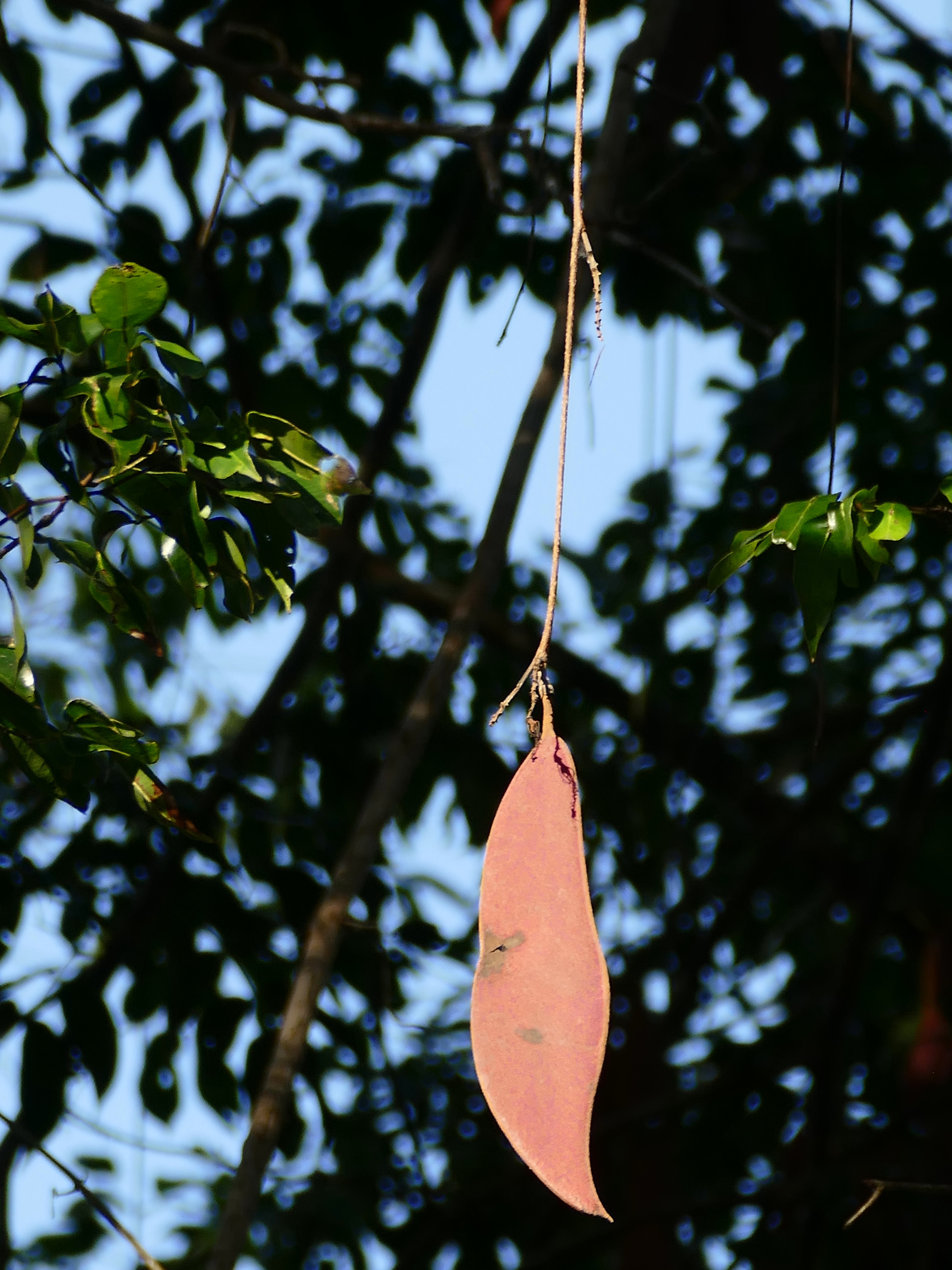 Piste de Belizon, Roura, French Guyana, FRANCE